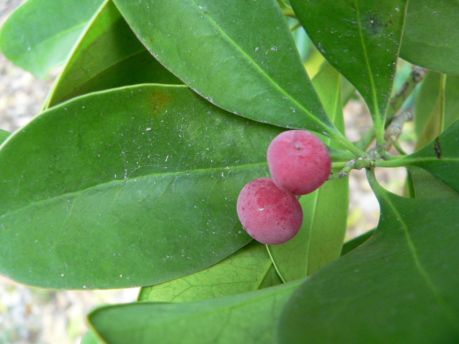 Canella winterana, Bois-Cannelle, fruits, Pointe des Châteaux, Guadeloupe